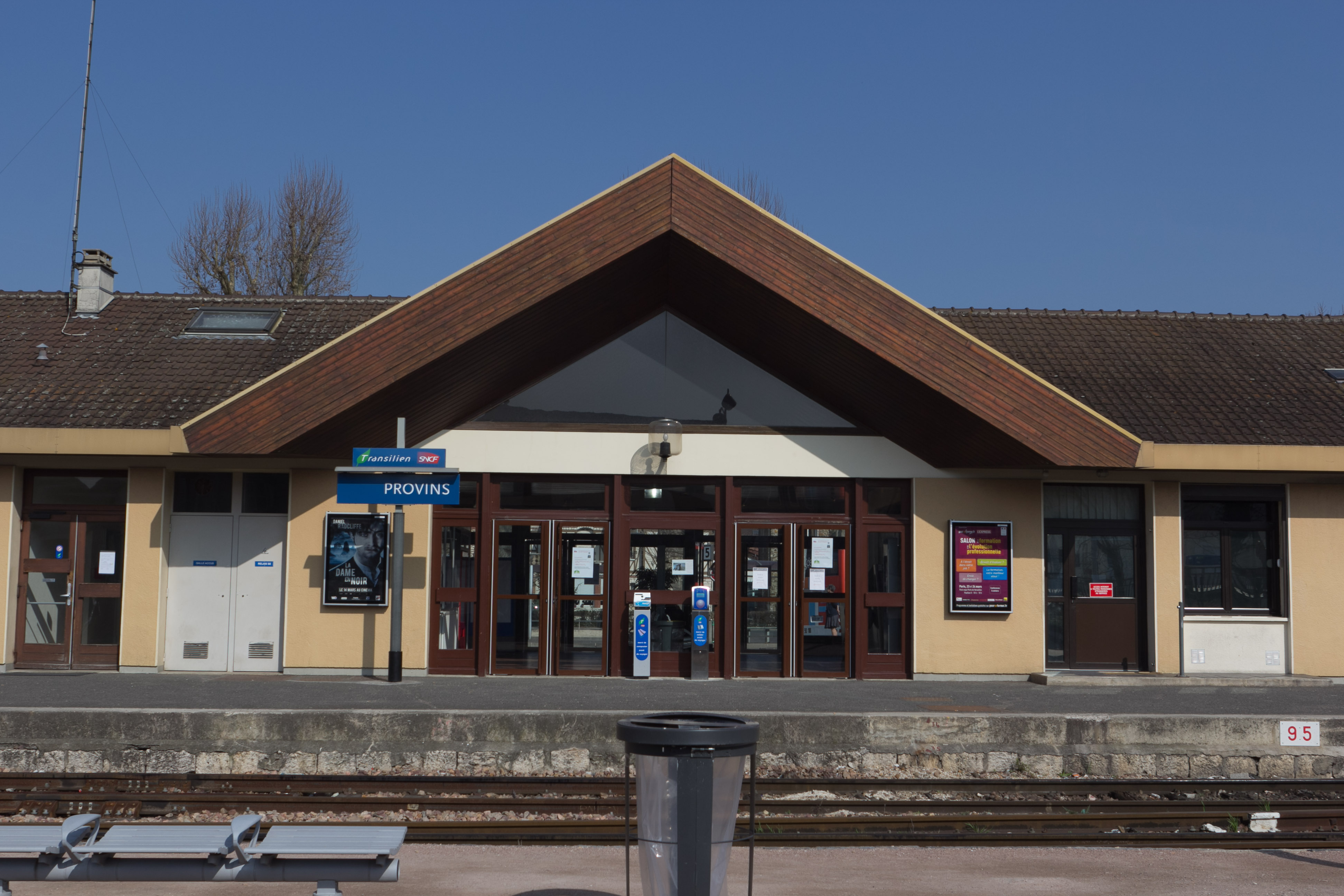 Gare de Provins, Provins, département de Seine-et-Marne, France